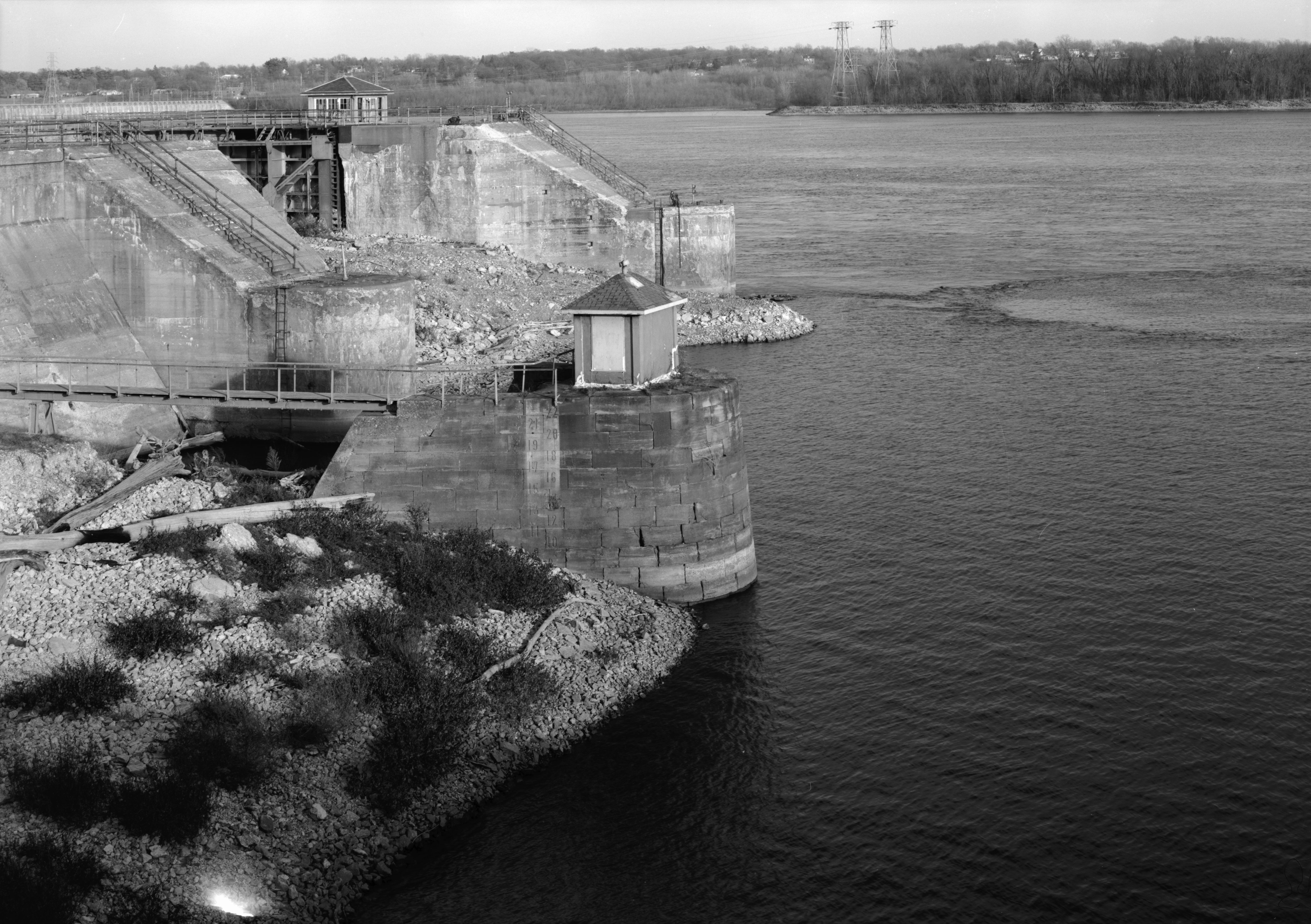 Mississippi River Lock and Dam No. 19, Keokuk, Iowa. (34. VIEW OF BULLNOSE, DES MOINES RAPIDS CANAL HAER IOWA,56-KEOK,3-34)